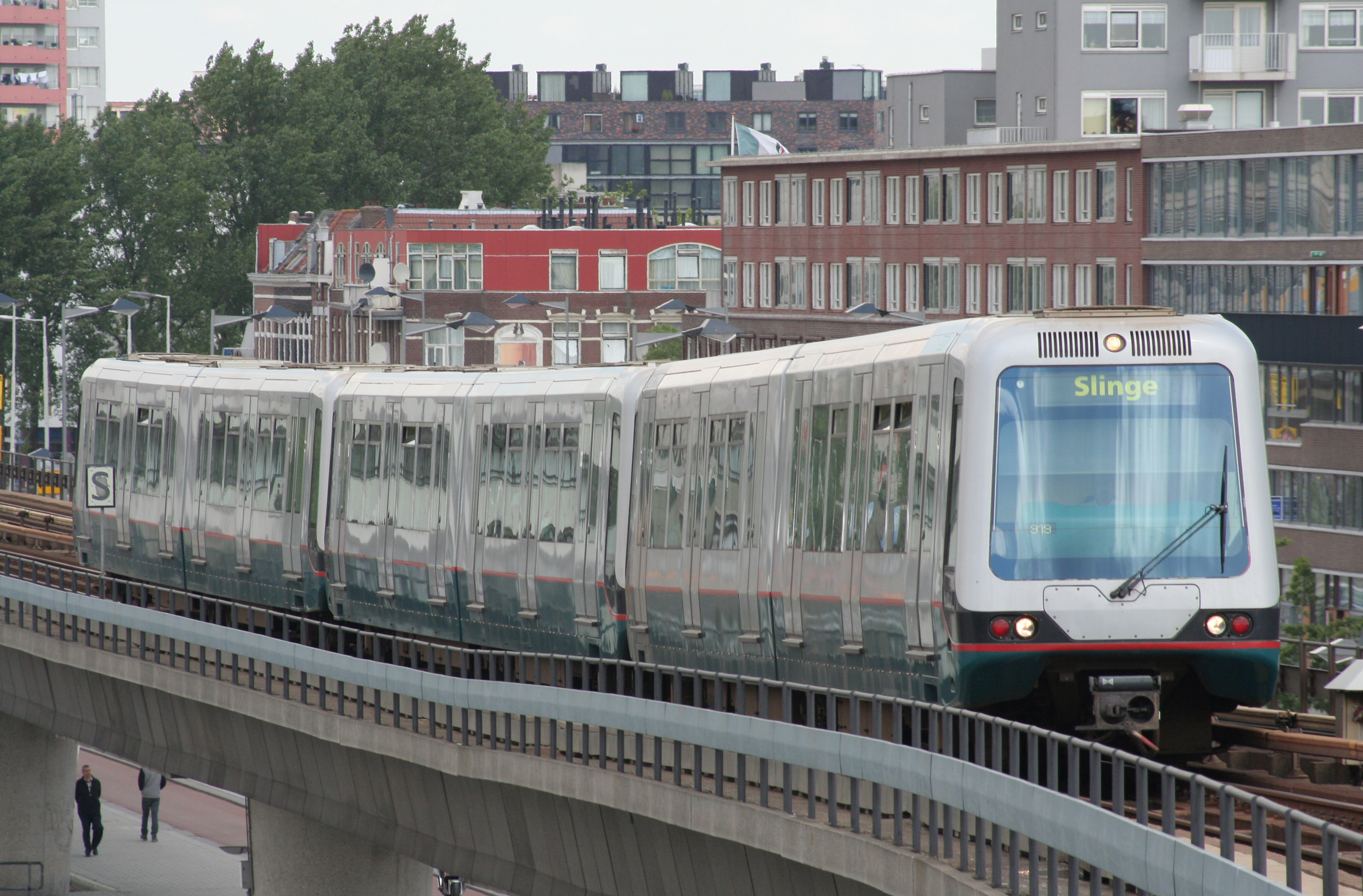 Metro van Rotterdam bovengronds